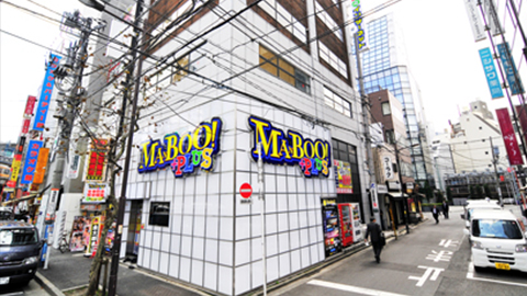 マンボーの神田に位置するマンボーPLUS店 レディスフロアなども用意されている